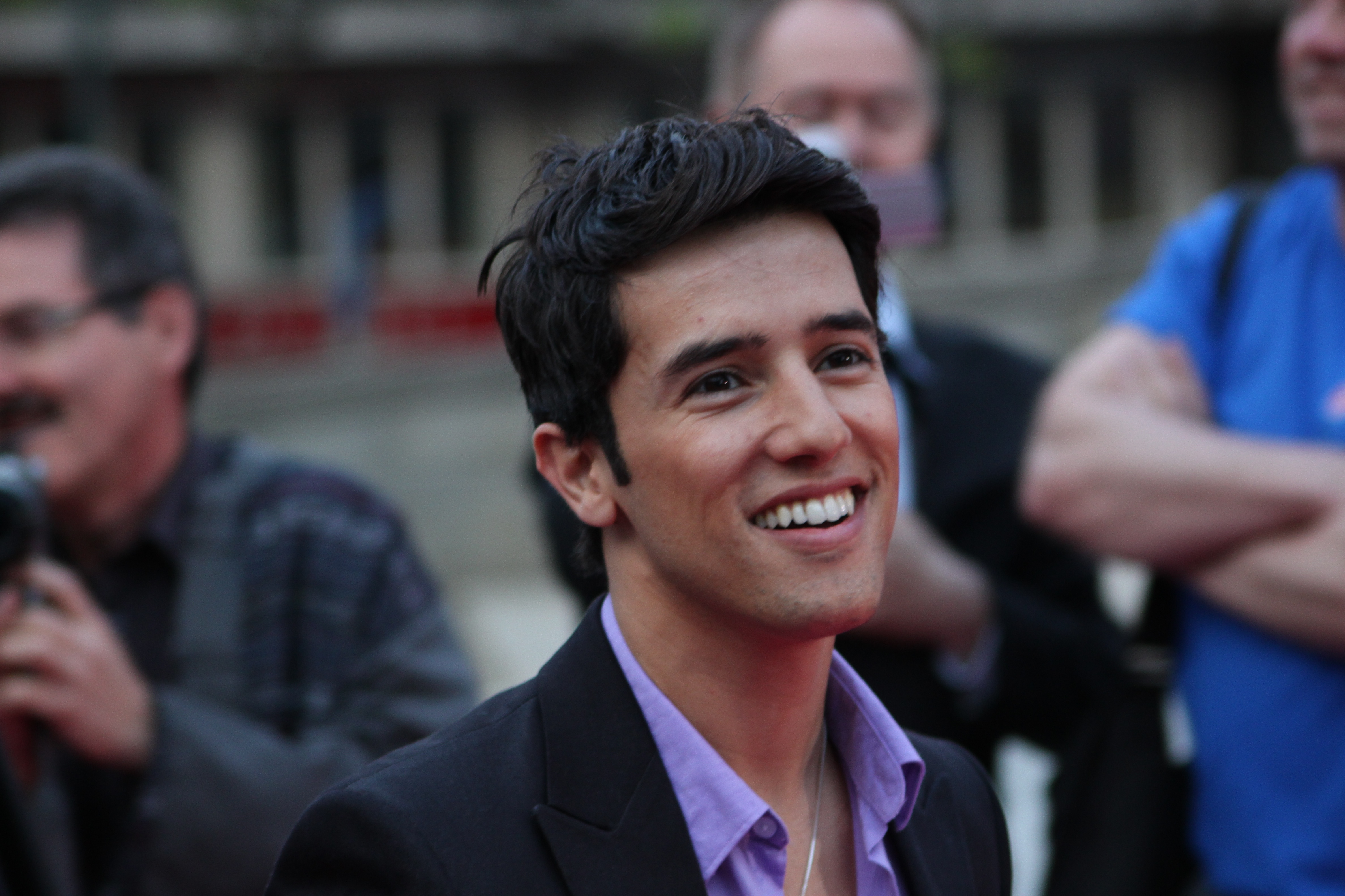 Foto: Vincent Hasselgård, Aktiv I Oslo.no